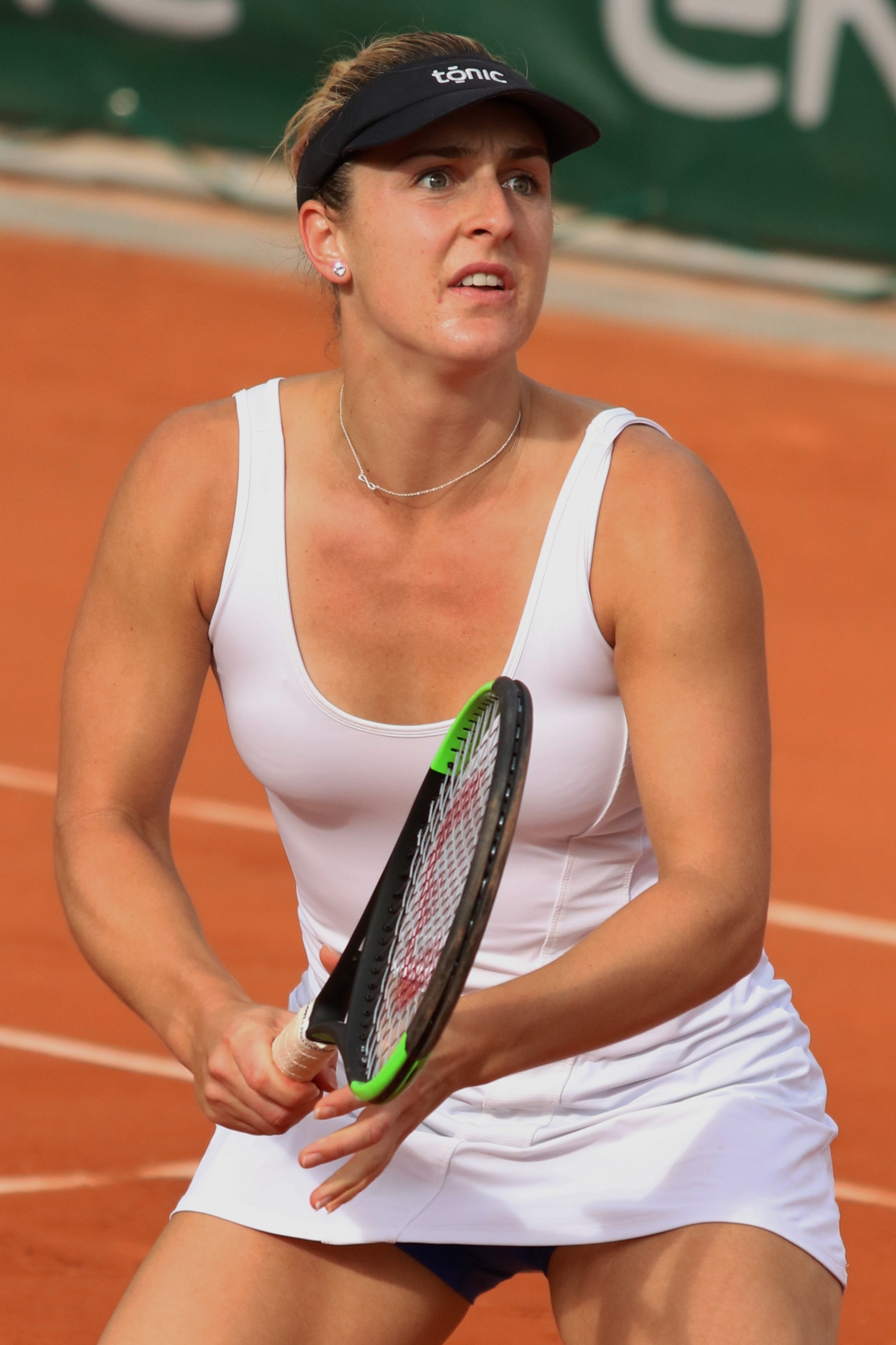 Dabrowski RG19 (48)